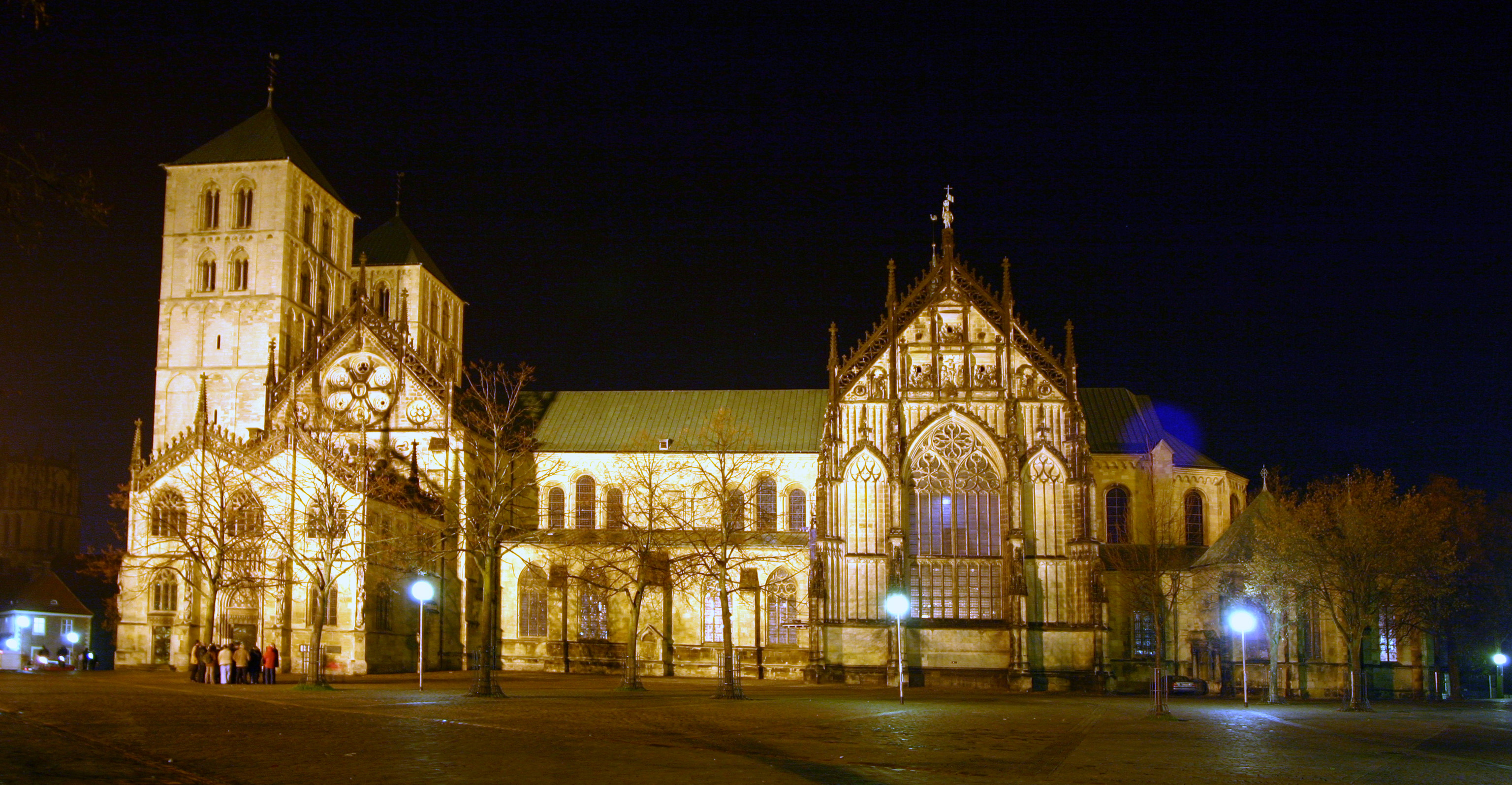 Der St.-Paulus-Dom ist der bedeutendste Kirchenbau in Münster